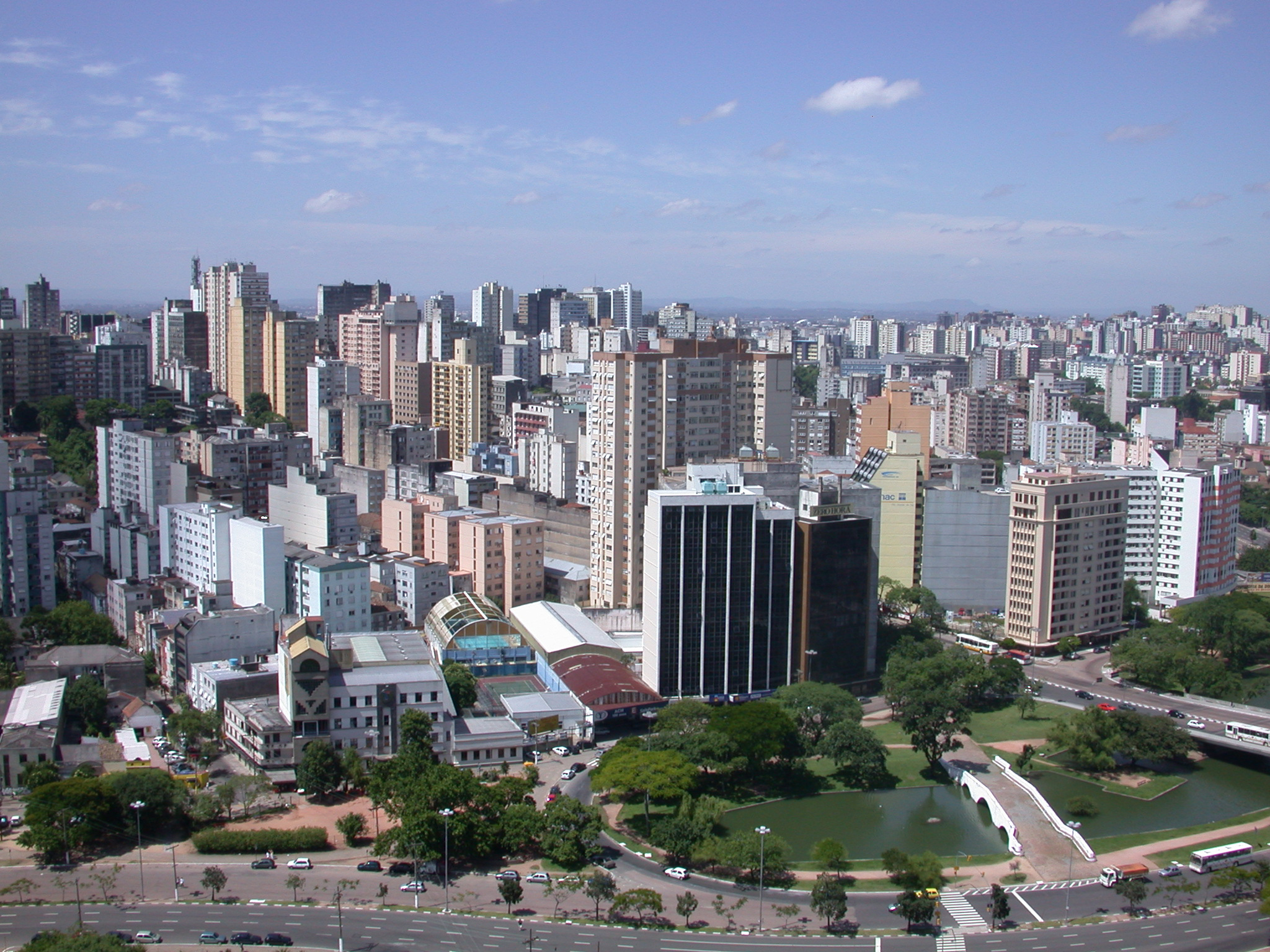 Descrição: Porto Alegre Fonte: Adreson Fotógrafo/Pintor: Eurivan Barbosa